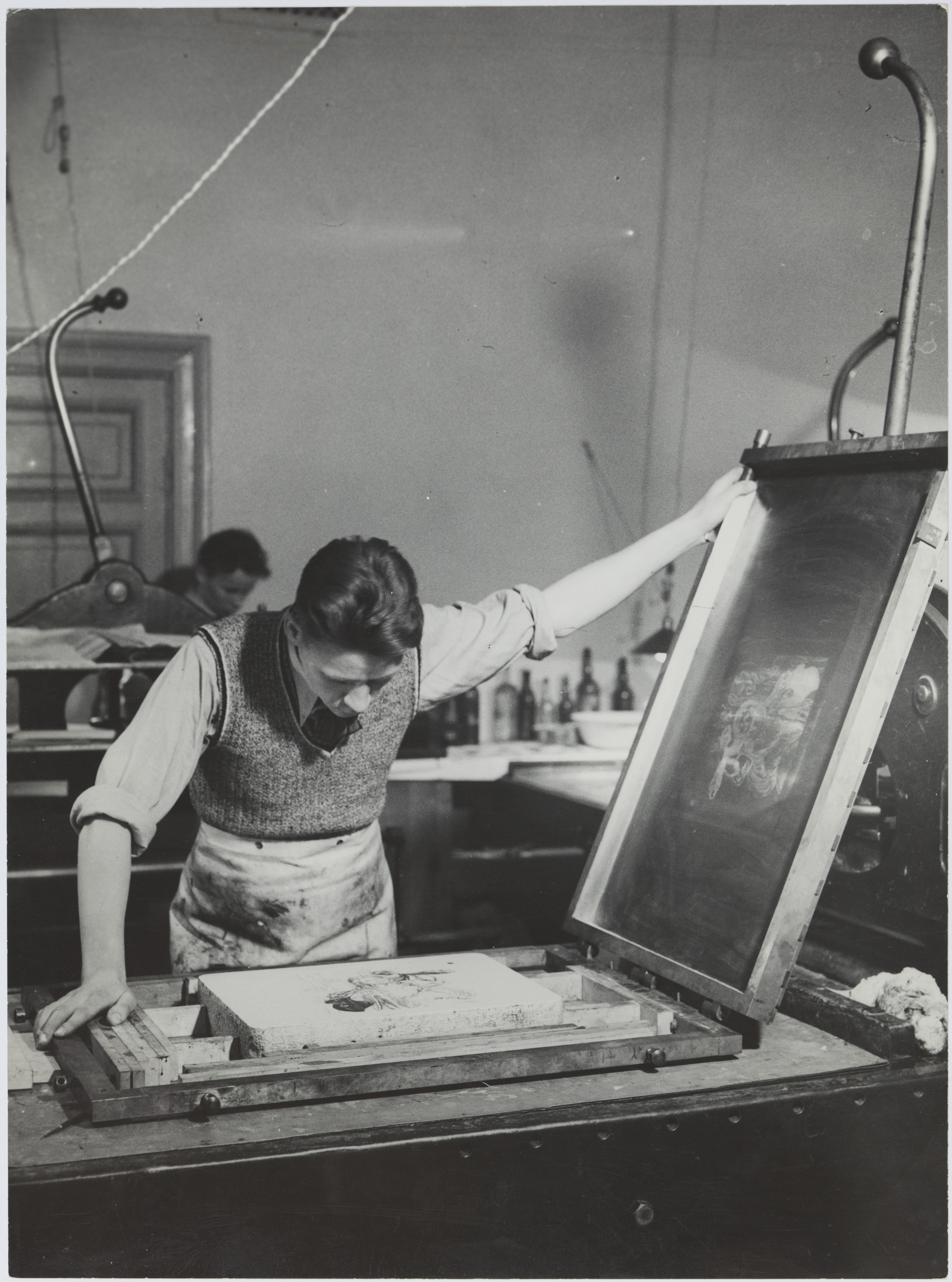 Litografian painamista graafisen taiteen osastolla, 1930-luku. Taideteollisuuskeskuskoulun opetustilanteita. Aalto-yliopisto / Aalto University Tiedätkö lisää tästä kuvasta? Jätä kommentti tai ota yhteyttä sähköpostitse: Lisätietoja kuvakokoelmista / more information